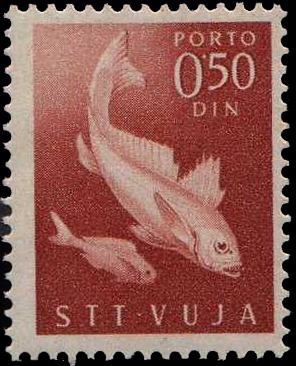 Доплатная марка Свободной территории Триест (Зона "Б") Postage Due, Free Territory of Trieste, Zone B (STT-VUJA: Free territory of Trieste, Military administration of Yugoslav Army)